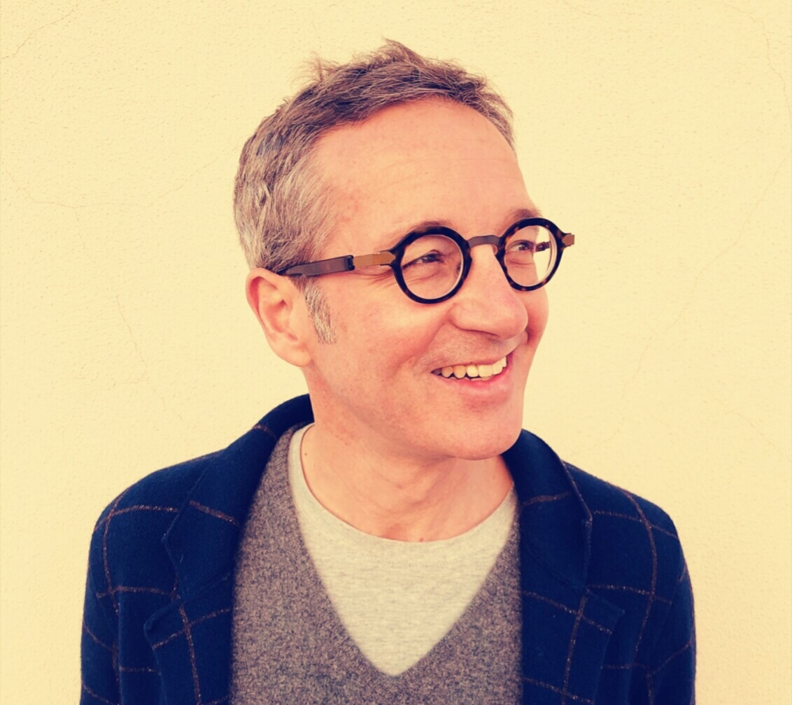 José María Lassalle